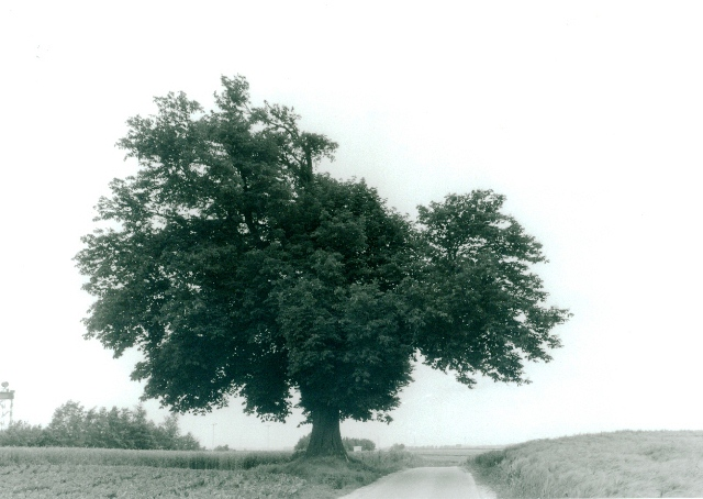 Riemst Millen Rukkelingenweg Grensboom